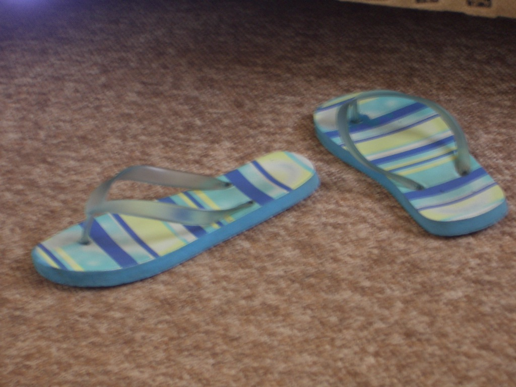 Flipflops